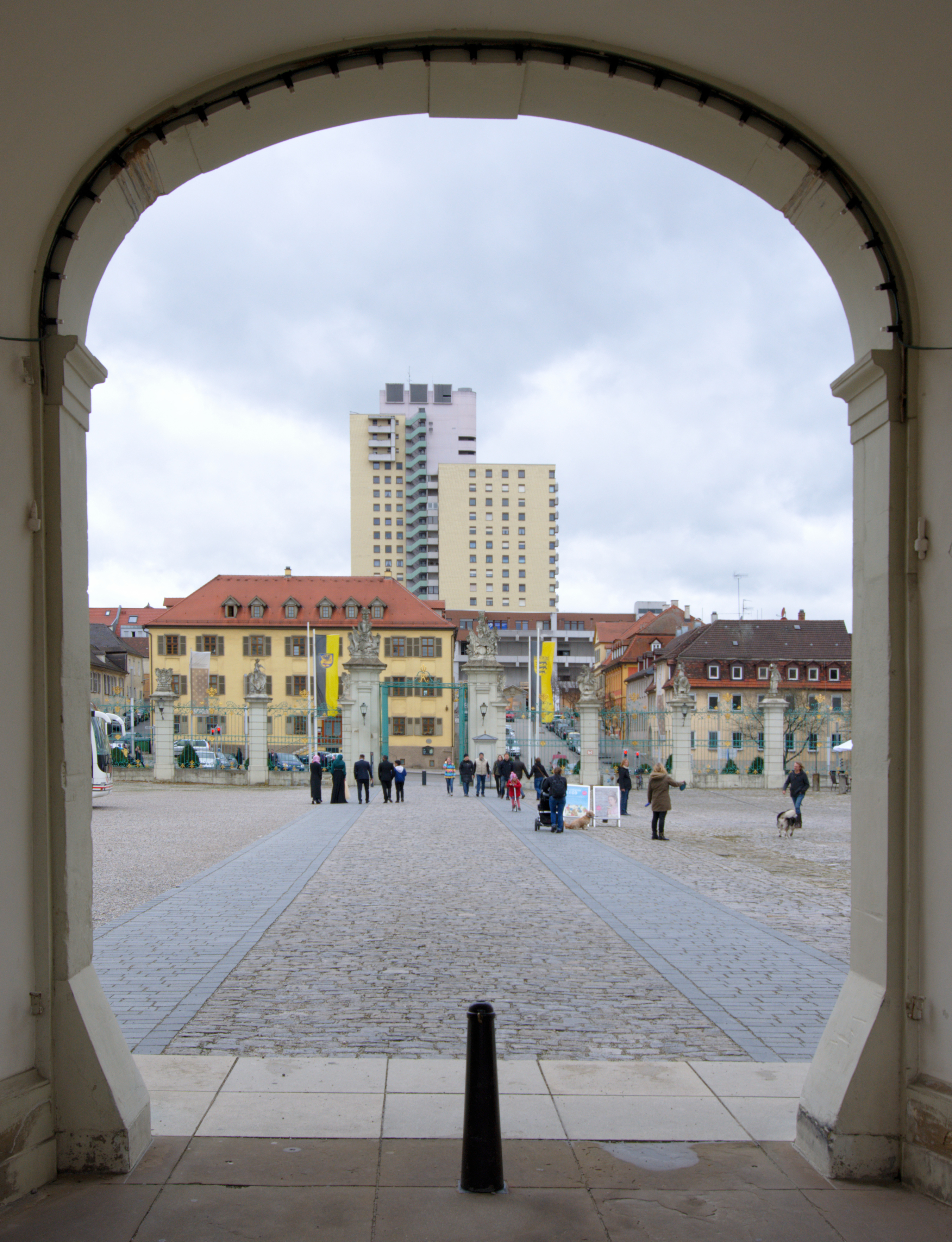 Blick vom Residenzschloss Ludwigsburg zum Marstall-Center